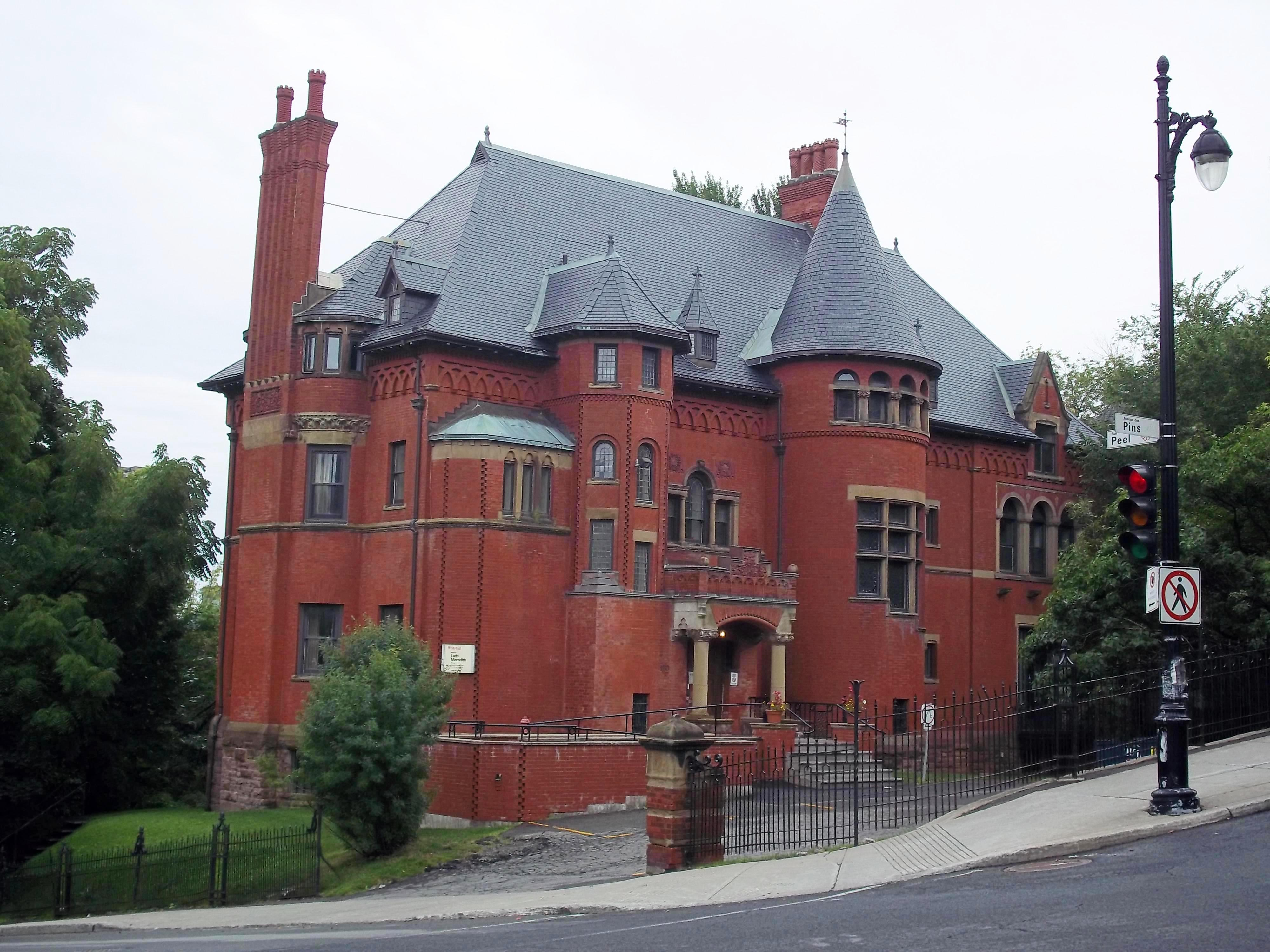 Résidence H.-Vincent-Meredith, 1110, avenue des Pins Ouest, Montréal